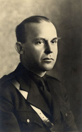 Meinoud Rost van Tonningen (1894-1945), politicus, Nederlands nationaal-socialist, in NSB-uniform, circa 1940.